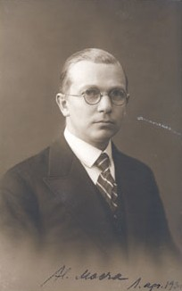 Harri Moora, eesti arheoloog